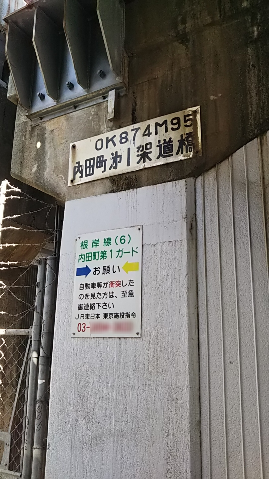 横浜市西区桜木町、JR根岸線 内田町第1架道橋